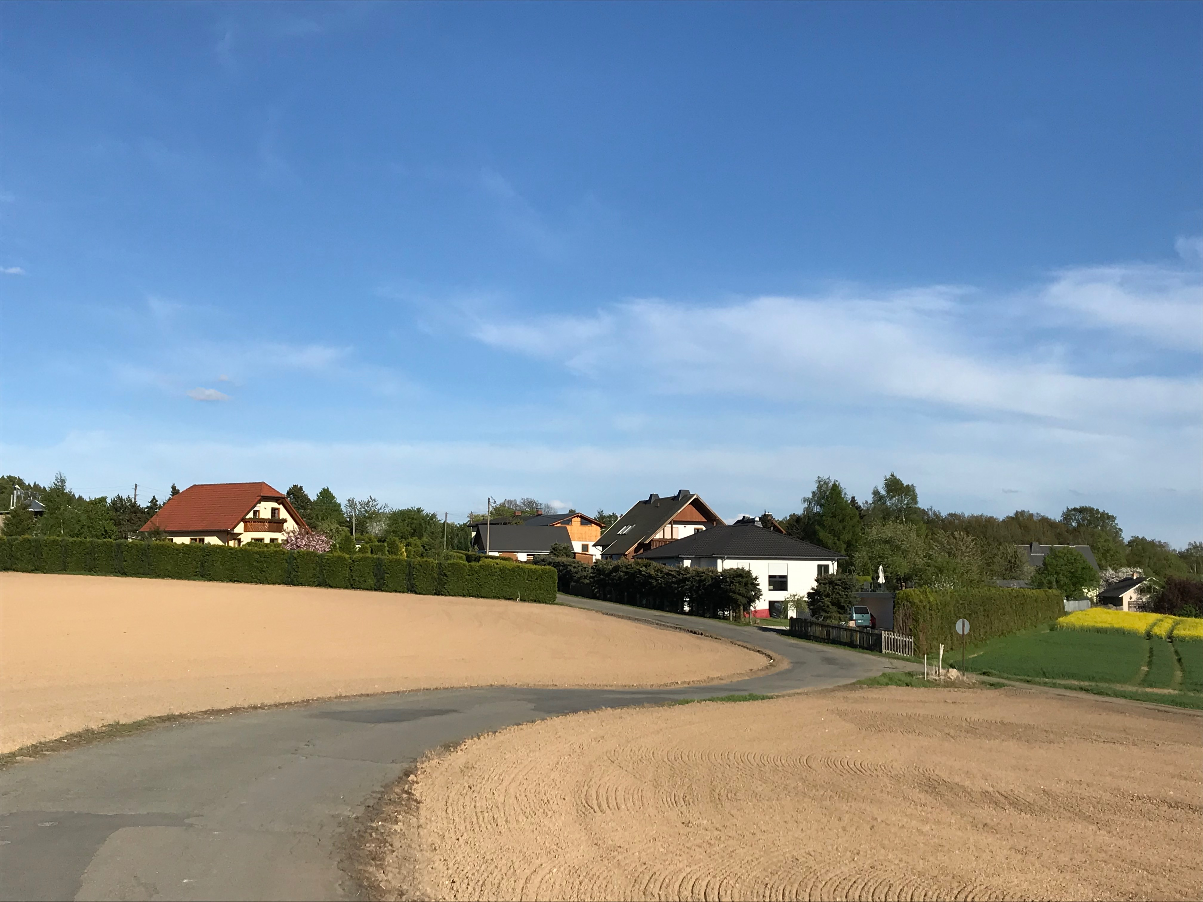 Ansicht Ortsteil Perlas (2018)